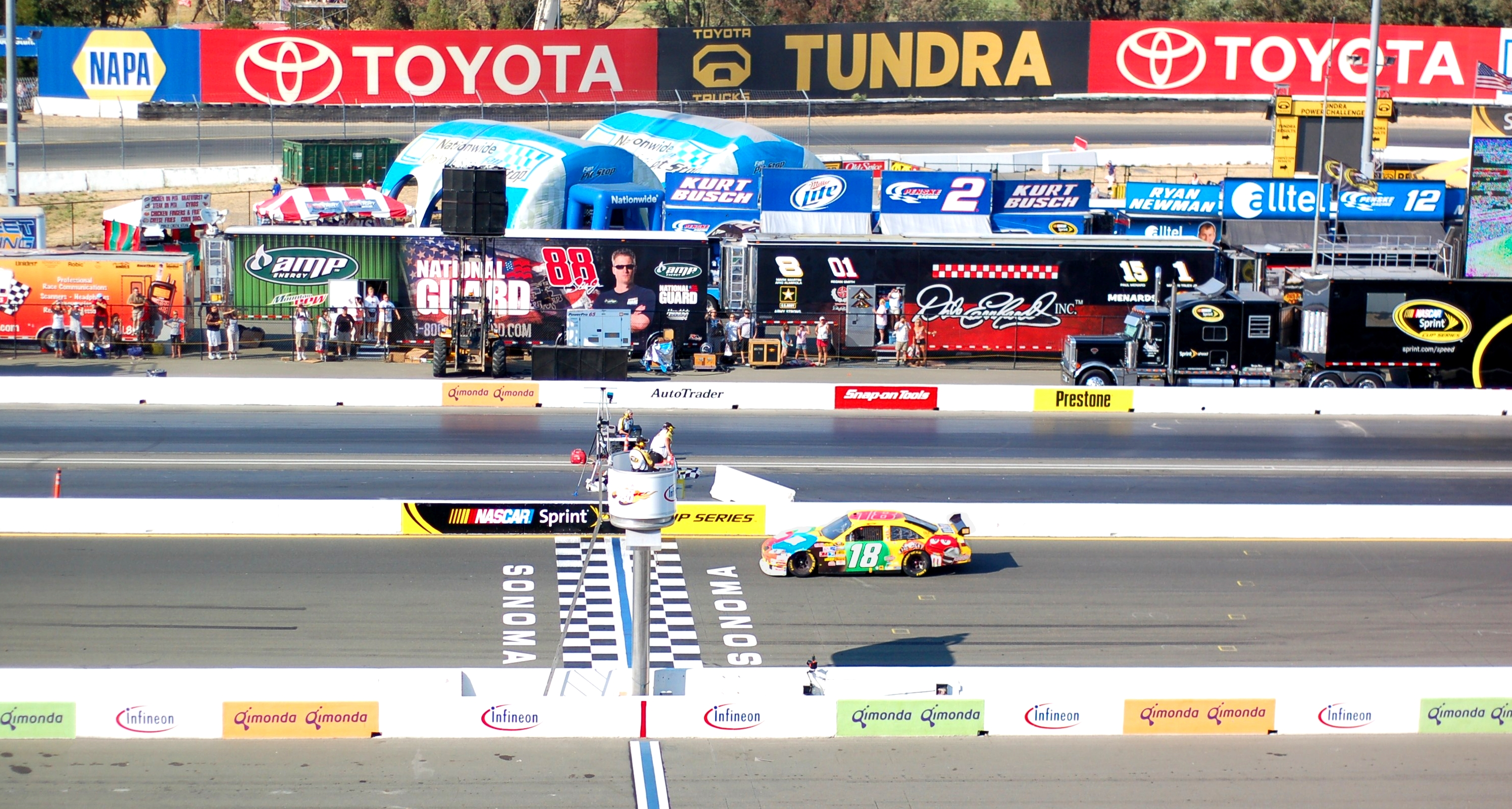 1st place